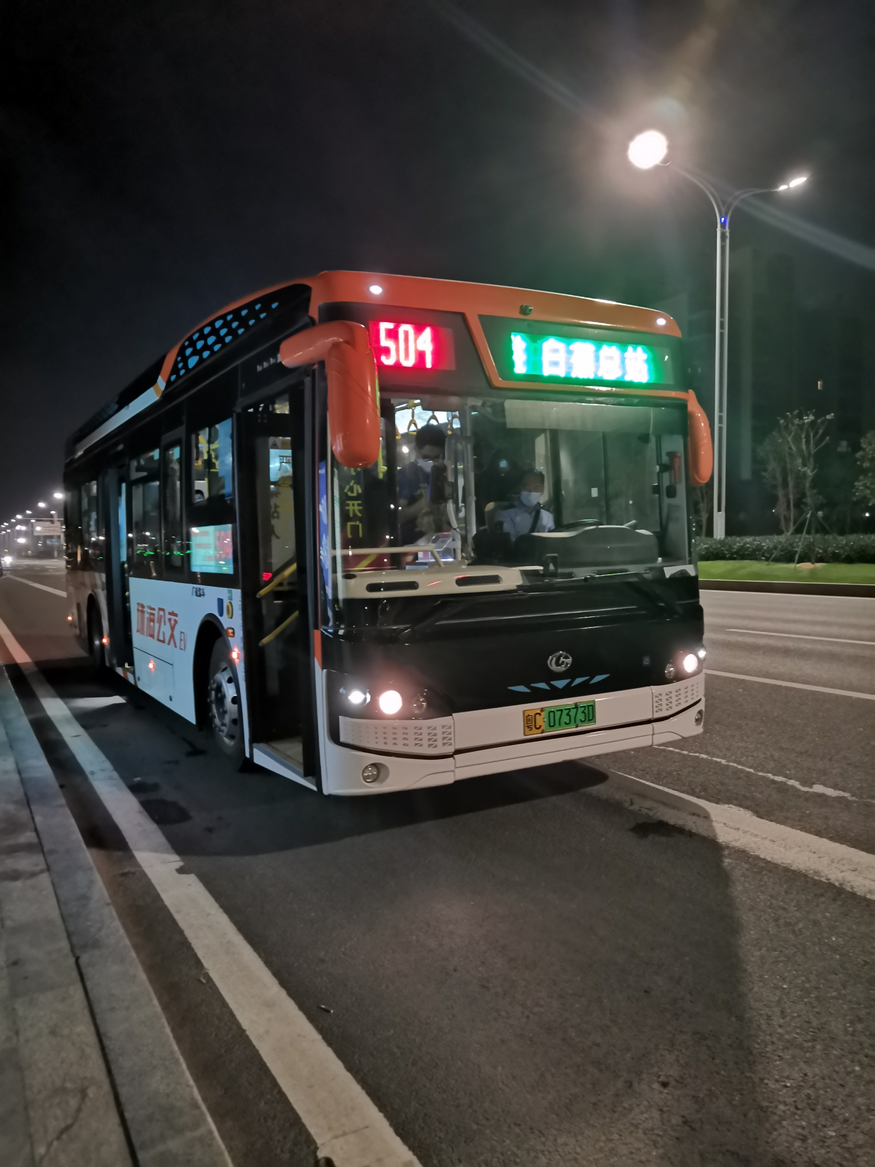 中文（中国大陆）: 珠海公交504路线